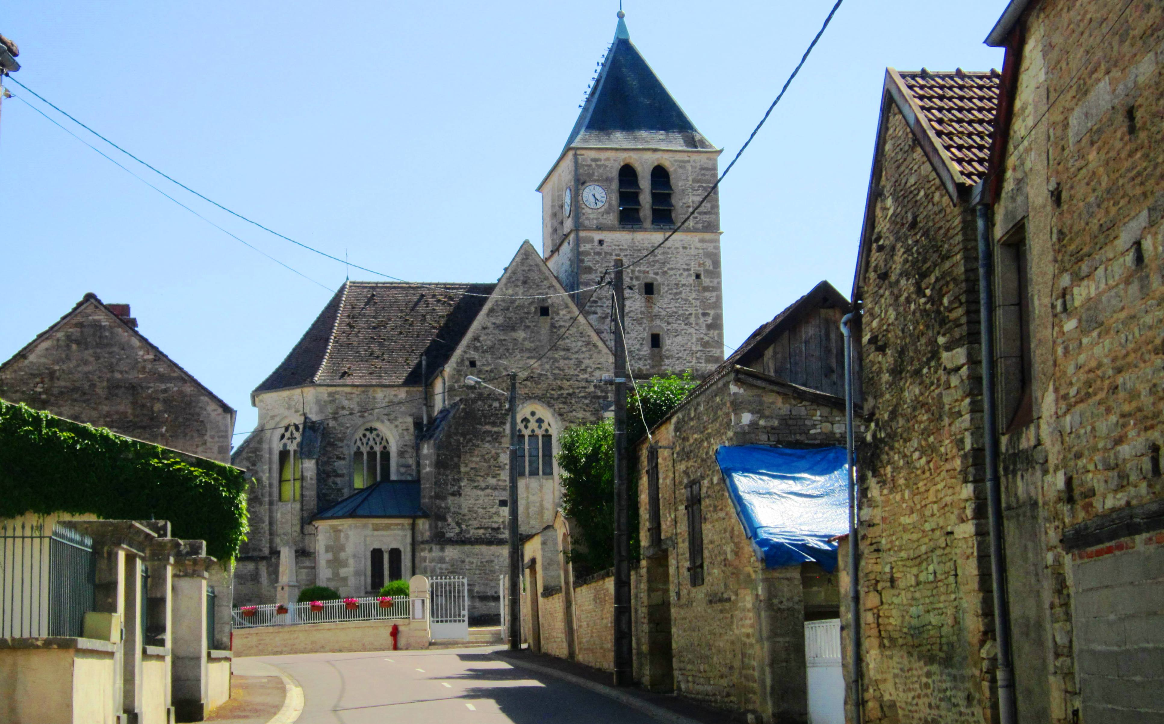 Eglise de Bouix (Côte-d'Or)